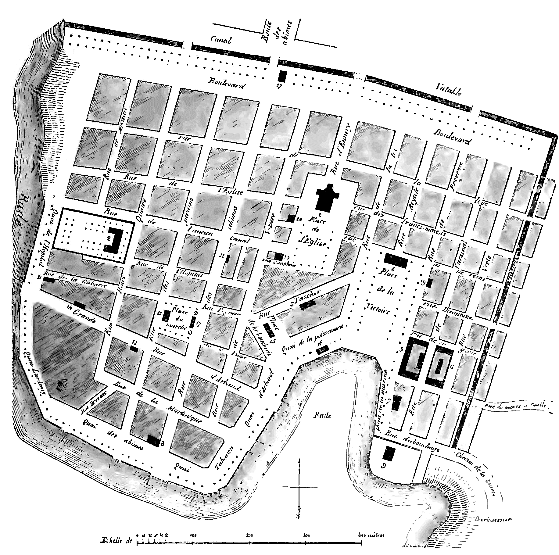 Plan de Pointe-à-Pitre, Guadeloupe en 1843 - Dressé par M Lemonnier de La Croix, ex-architecte-voyer de la ville de la Pointe-à-Pitre - 1. Église-2. Hôpital.-3. Tribunal.-4. Théâtre-5. Caserne d'infanterie de marine.-6. Prisons.-7. Entrepôt.-8. Douane.-9. Arsenal.-10. Caserne de la gendarmerie.-11. Bureaux de la marine.-12. Magasins des pompiers.-13. Mairie.-14. Trésor-15. Halle à la boucherie.-16. Halle aux poissons.-17. Corps-de-garde.-18. Bureaux de la police.-19. Bureaux de l'administration intérieure.-20. Presbytère.